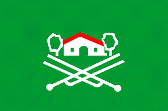 bandera del sindicat ENB-ENA